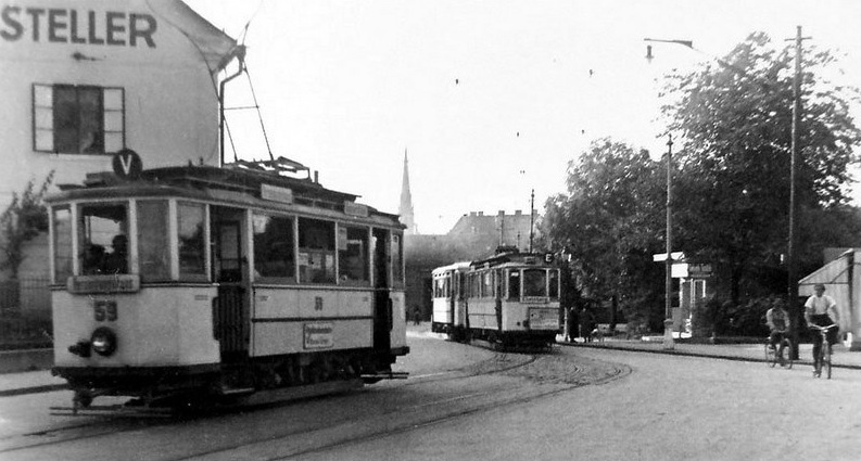 Friedhofstraße Linz mit Straßenbahn. Vor Errichtung der Unterführung Blumau/Wiener Straße 1937 fuhr die Straßenbahn durch die Unterführung Humboldtstraße/Friedhofstraße